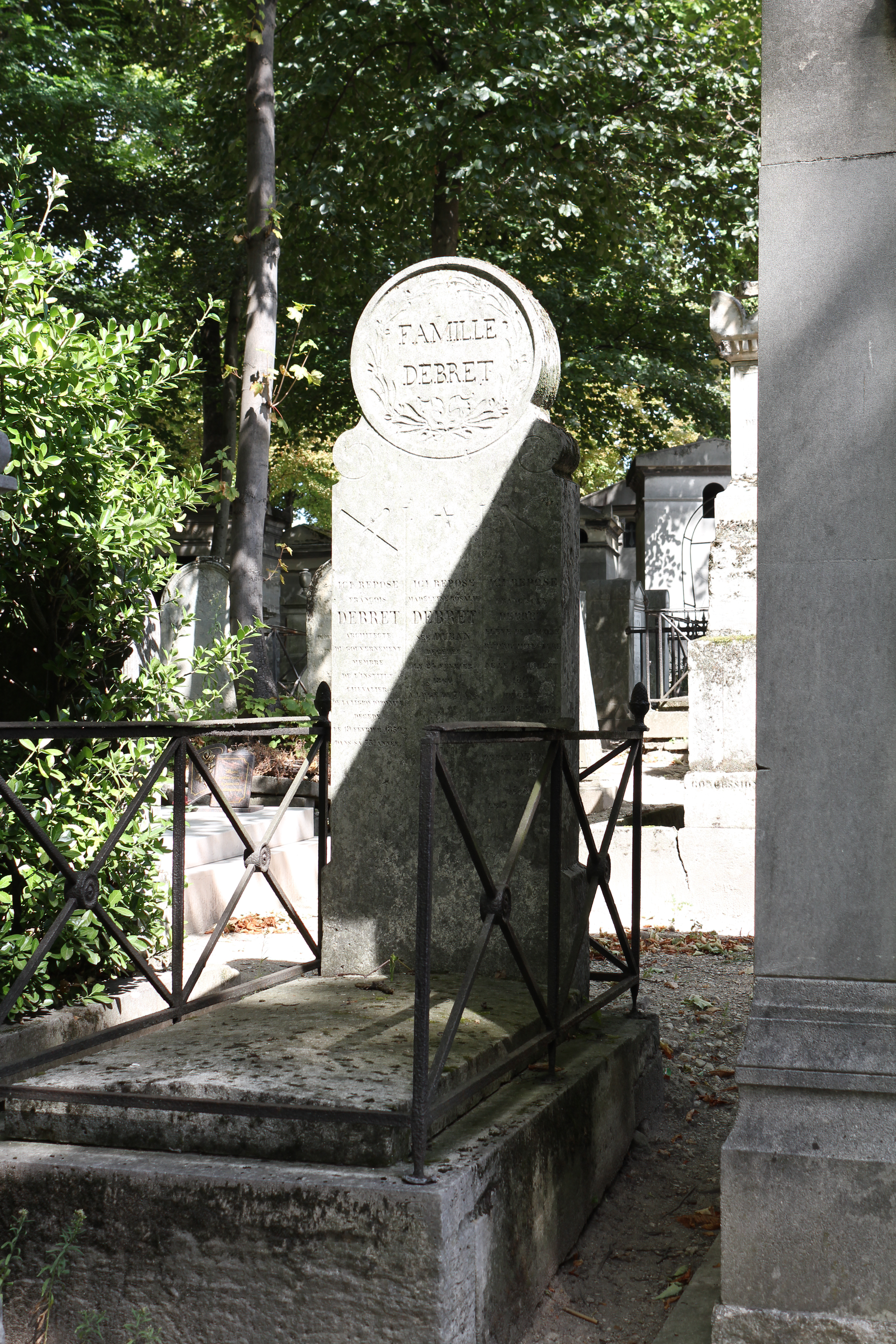 Sépulture de François Debret (1777-1850), architecte franc-maçon.